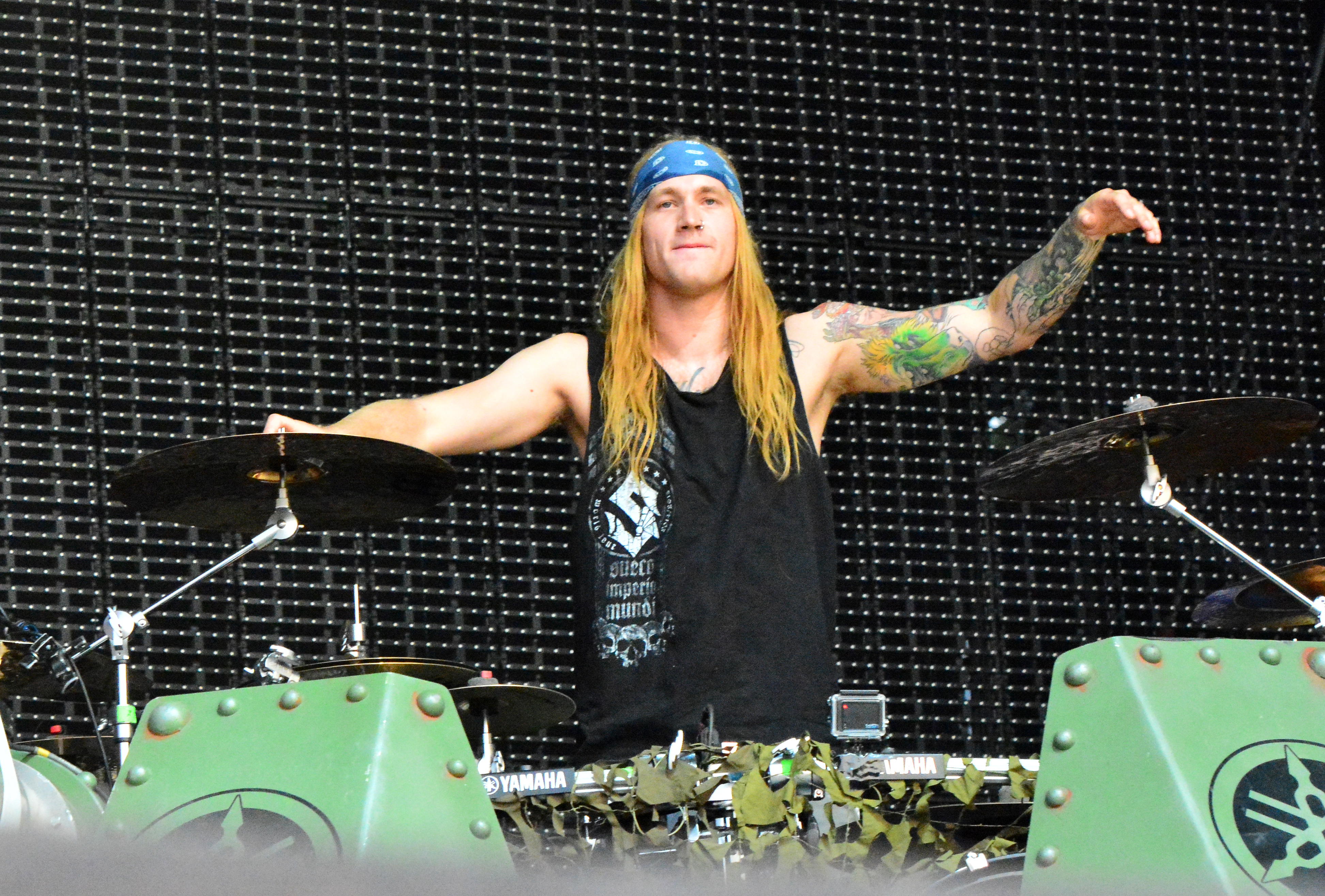 Sabaton beim Wacken Open Air 2015